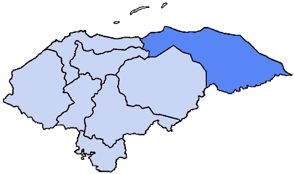 Mappa della diocesi cattolica di Trujillo, in Honduras.